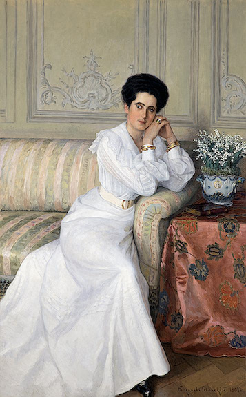 В каталоге музея портрет считается изображением княгини Дарьи Михайловны Горчаковой, ур. Бибиковой (1882-1962) жены князя Александра Константиновича Горчакова. В журнале «Столица и усадьбы» (№ 62-63 за 1916) в статье посвященной особняку князя К. А. Горчакова воспроизведен как портрет его дочери — Марии Константиновны (1871—1924), в замужестве сначала княгини Кудашевой, затем Брянчаниновой, фотографические портреты которой полностью подтверждают эту атрибуцию.)